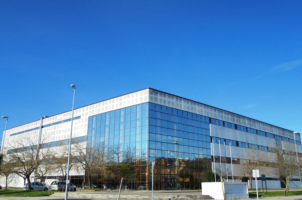 Escuela Superior de Ingeniería Forestal Pontevedra capital